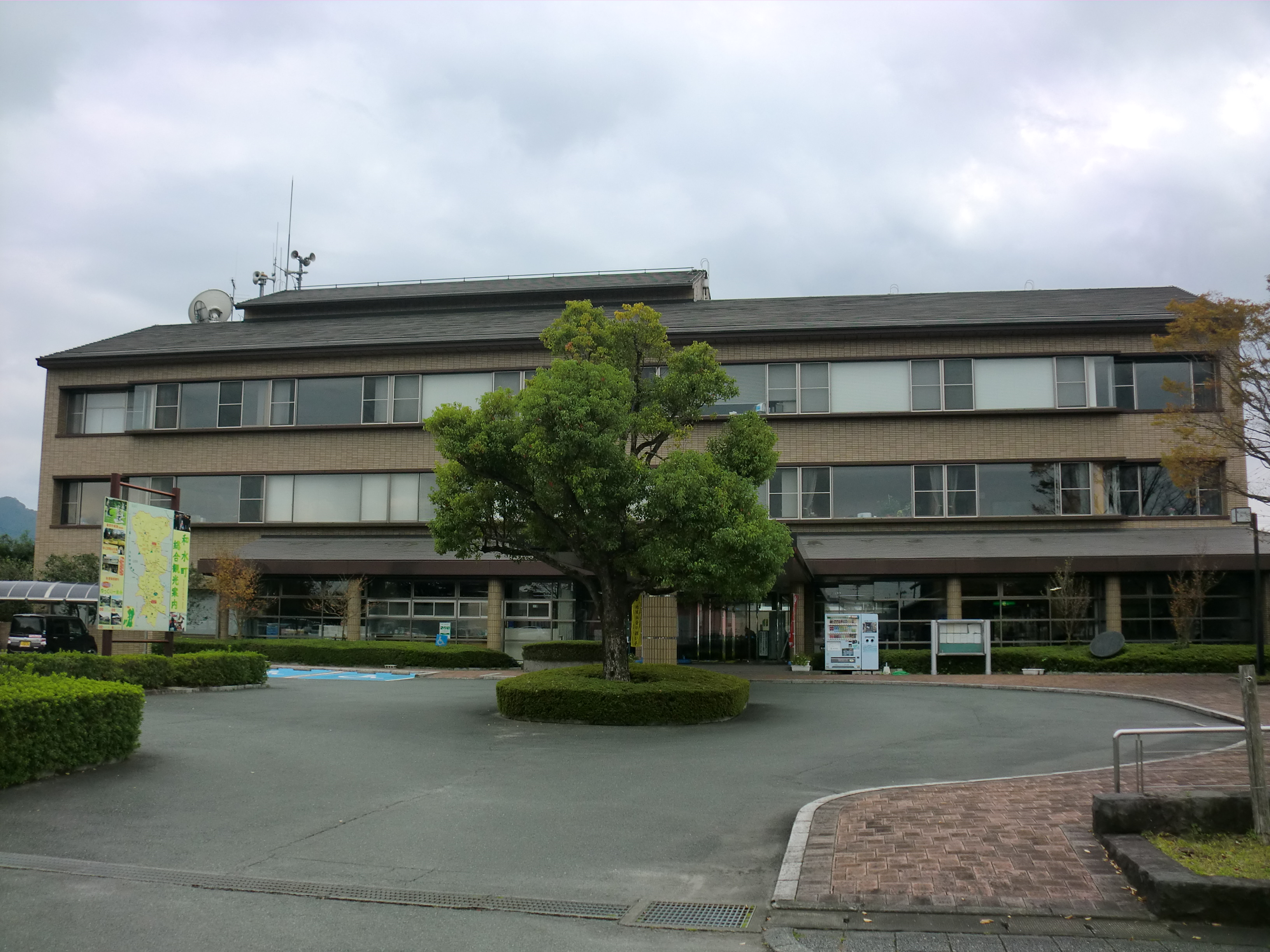 熊本県玉名郡和水町にある和水町役場